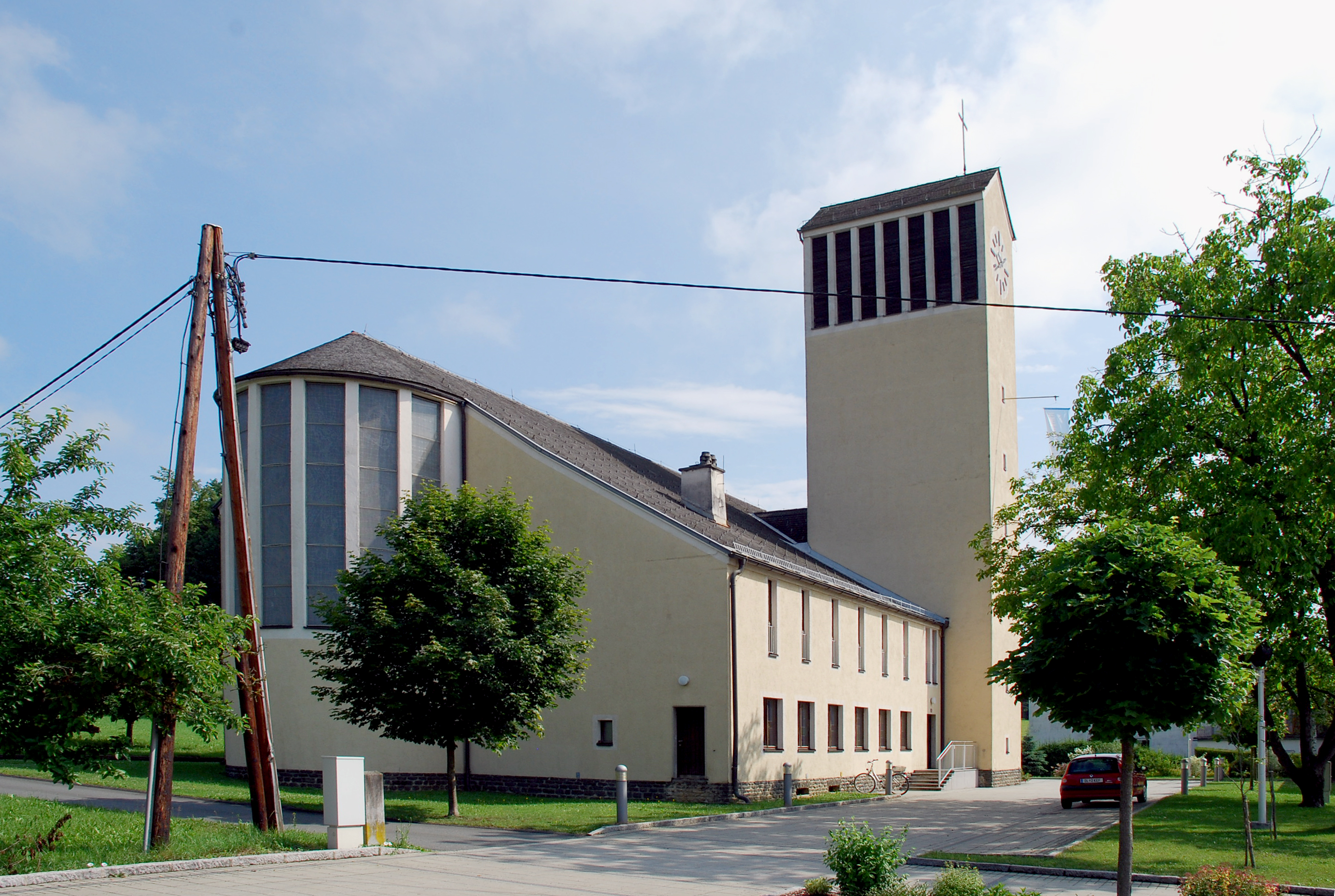 Pölfing-Brunn, Gemeindeteil Brunn, Steiermark, Österreich: Pfarrkirche St. Maria in Brunn